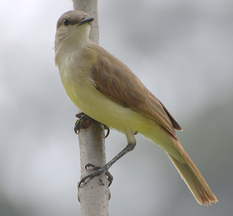 Cattle Tyrant (Brazil=Suiriri-cavaleiro; Bem-te-vi-do-gado)